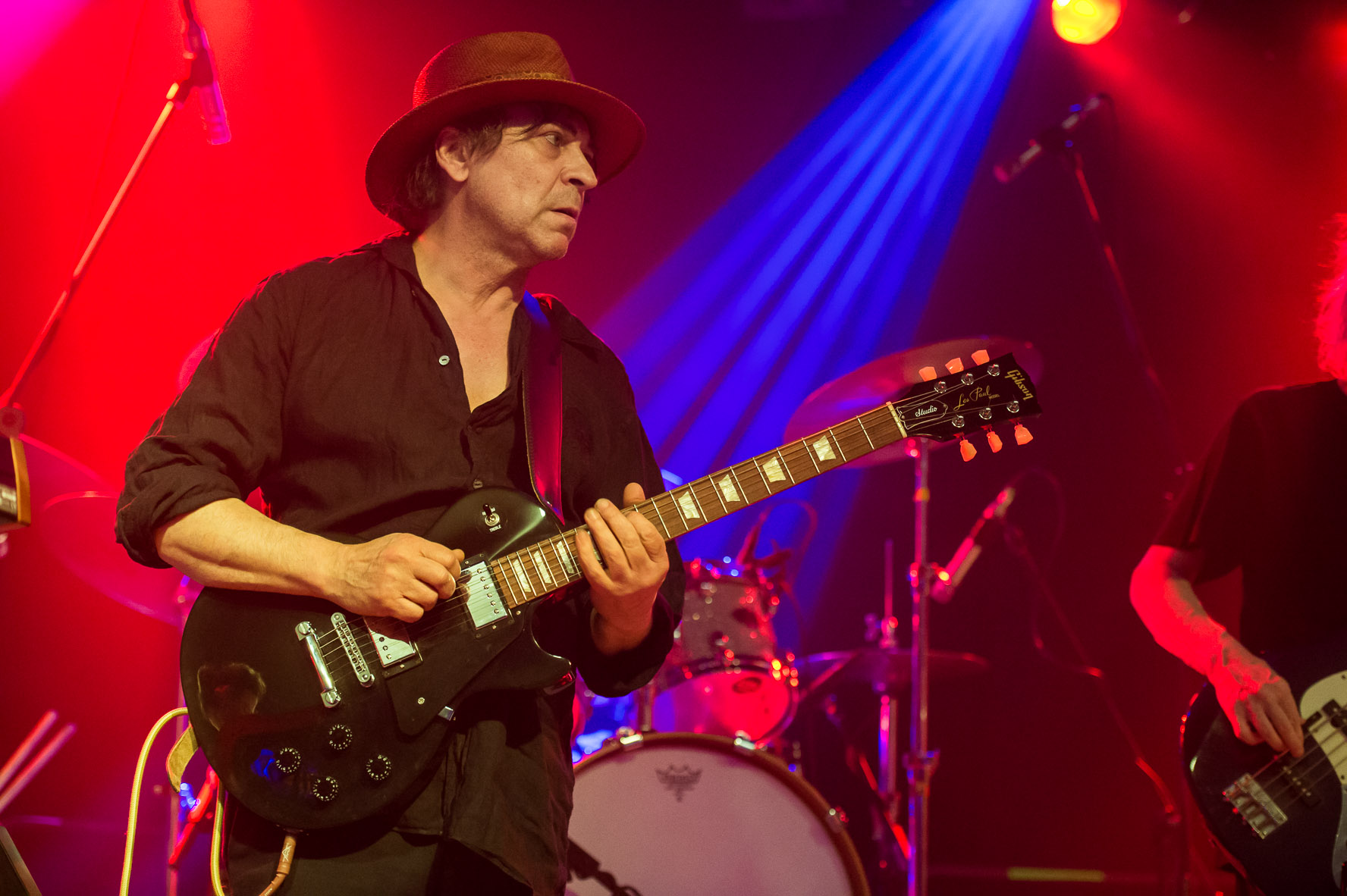 Ton Steine Scherben - Ding Ding Dang Dang-Tour 2014 im Hirsch in Nürnberg am 08.04.2014 Der Hirsch,Ding Ding Dang Dang,Konzert,Livekonzert,Livemusik,RPS Lanrue,Ton Steine Scherben,Tour2014